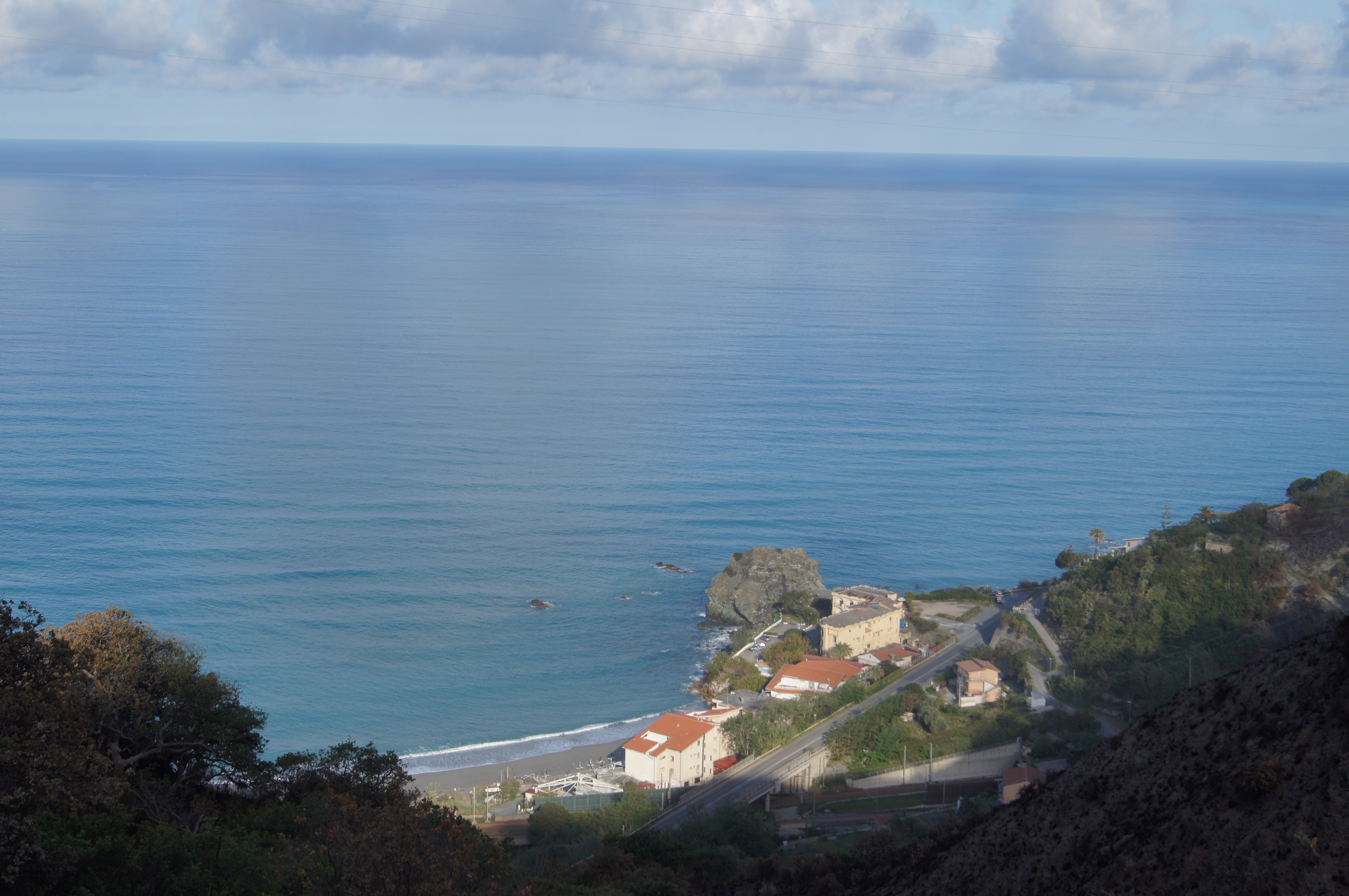 Panorama di Coreca, Calabria visto dal Colle degli Ulivi